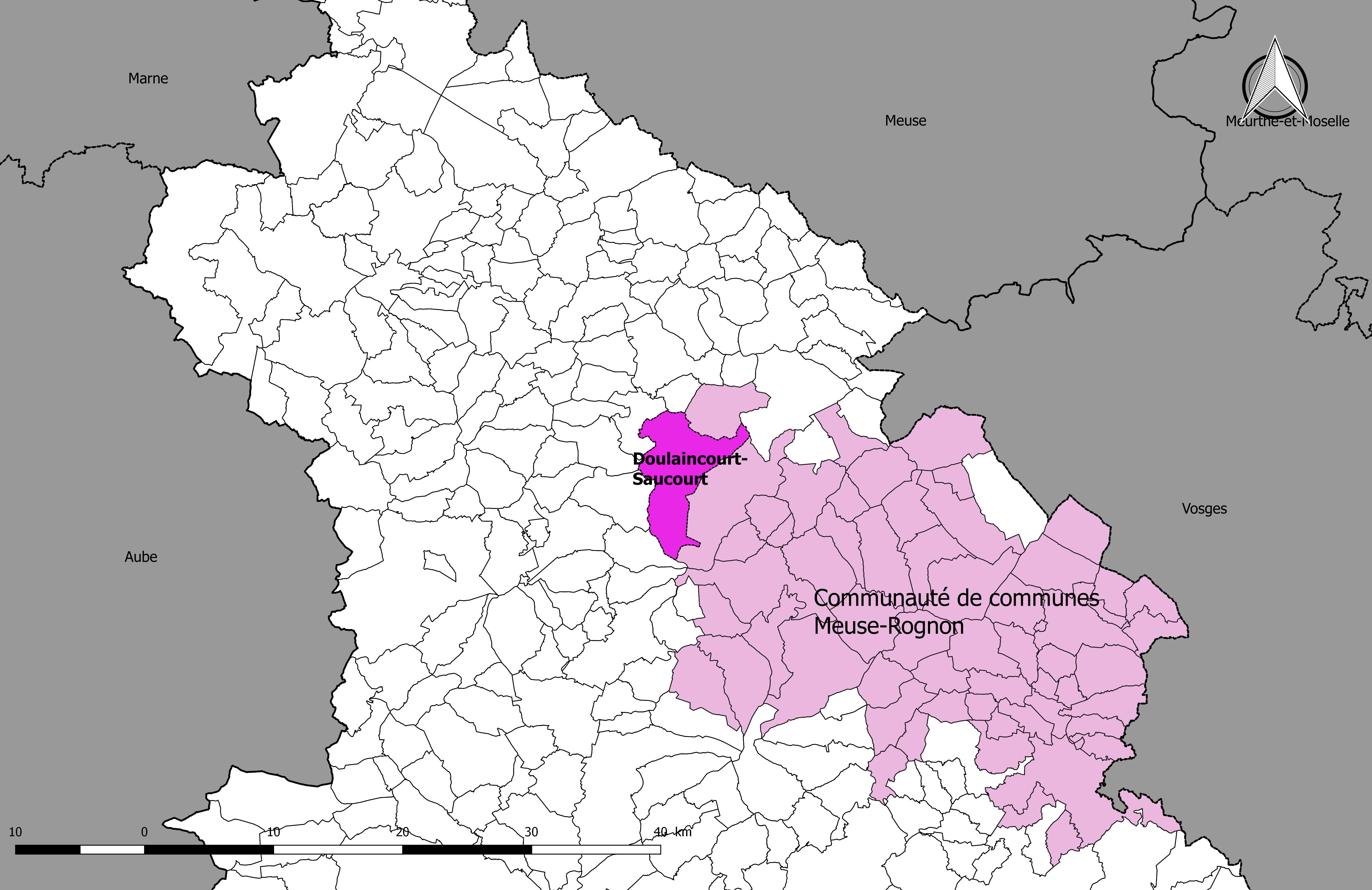 Localisation de la commune de Doulaincourt-Saucourt dans la communauté de communes Meuse-Rognon